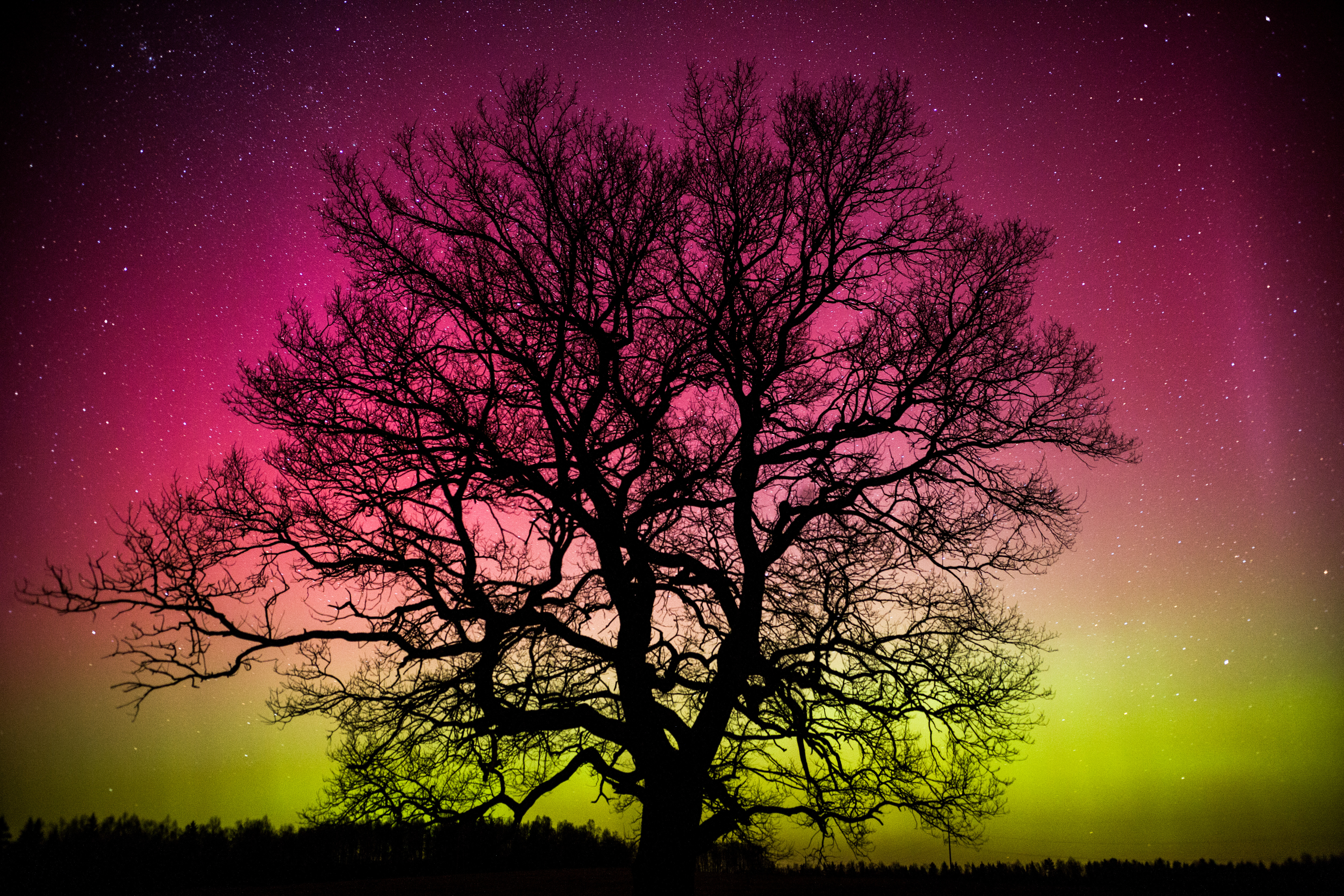 Паўночнае ззянне ля вёскі Вязынка (Маладзечанскі раён Менскай вобласці, Беларусь). Беларуская (тарашкевіца): Паўночнае зьзяньне ля вёскі Вязынка (Маладэчанскі раён Менскай вобласьці, Беларусь).